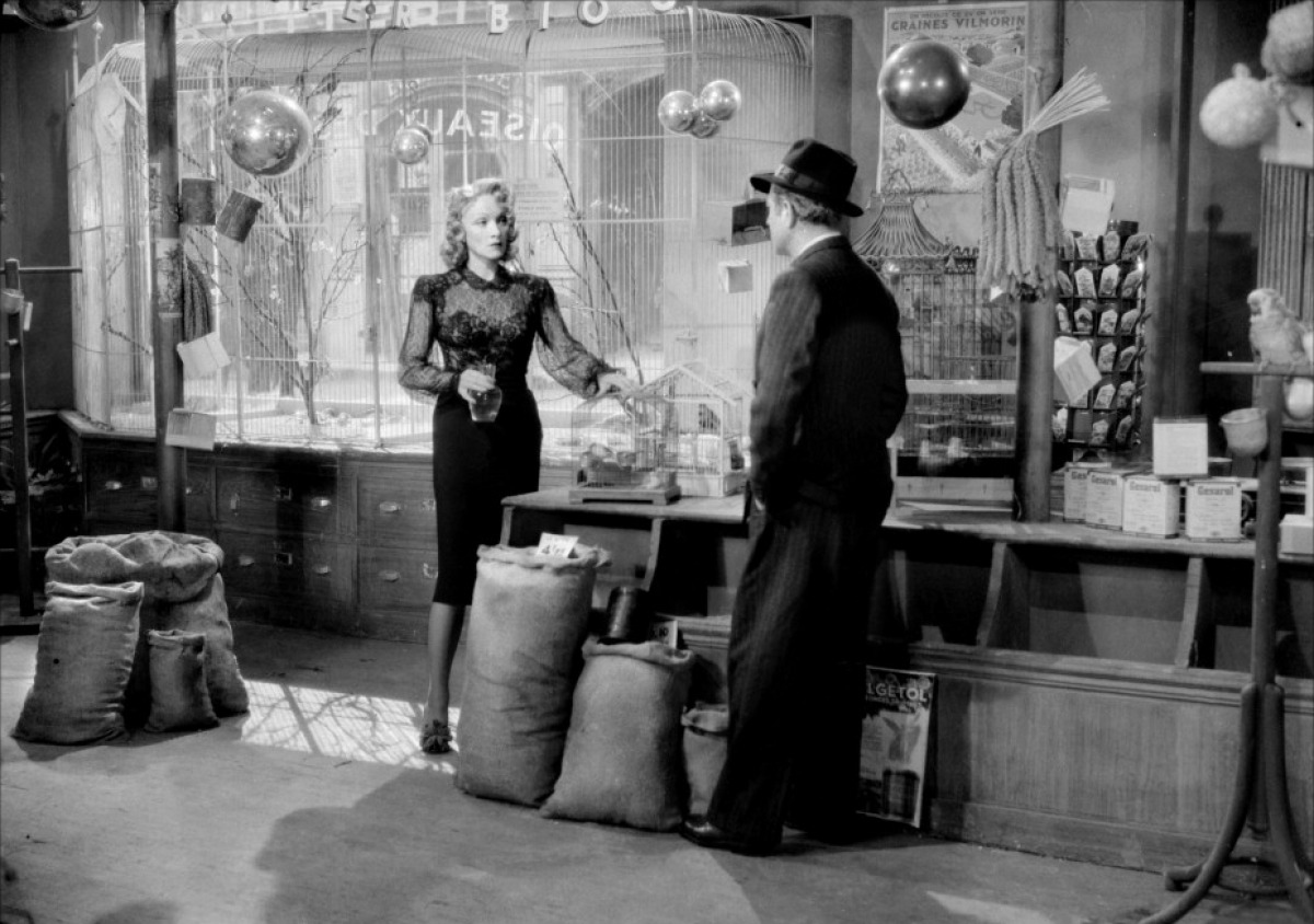 Costumes pour Marlene Dietrich 1946.